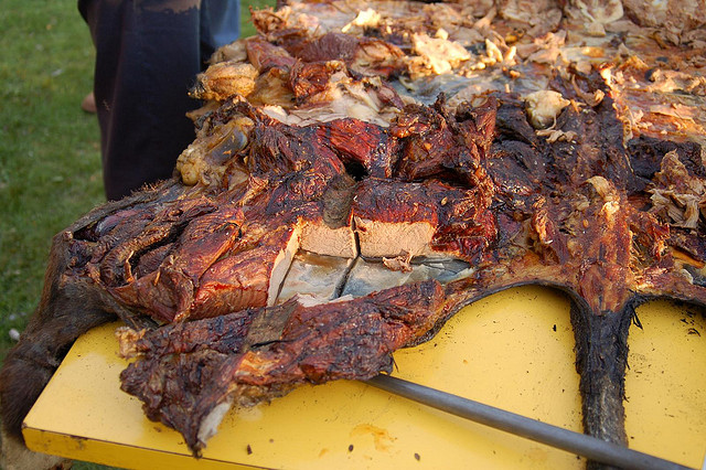 Está sabrosísimo, blando como un manjar que se derrite en la boca